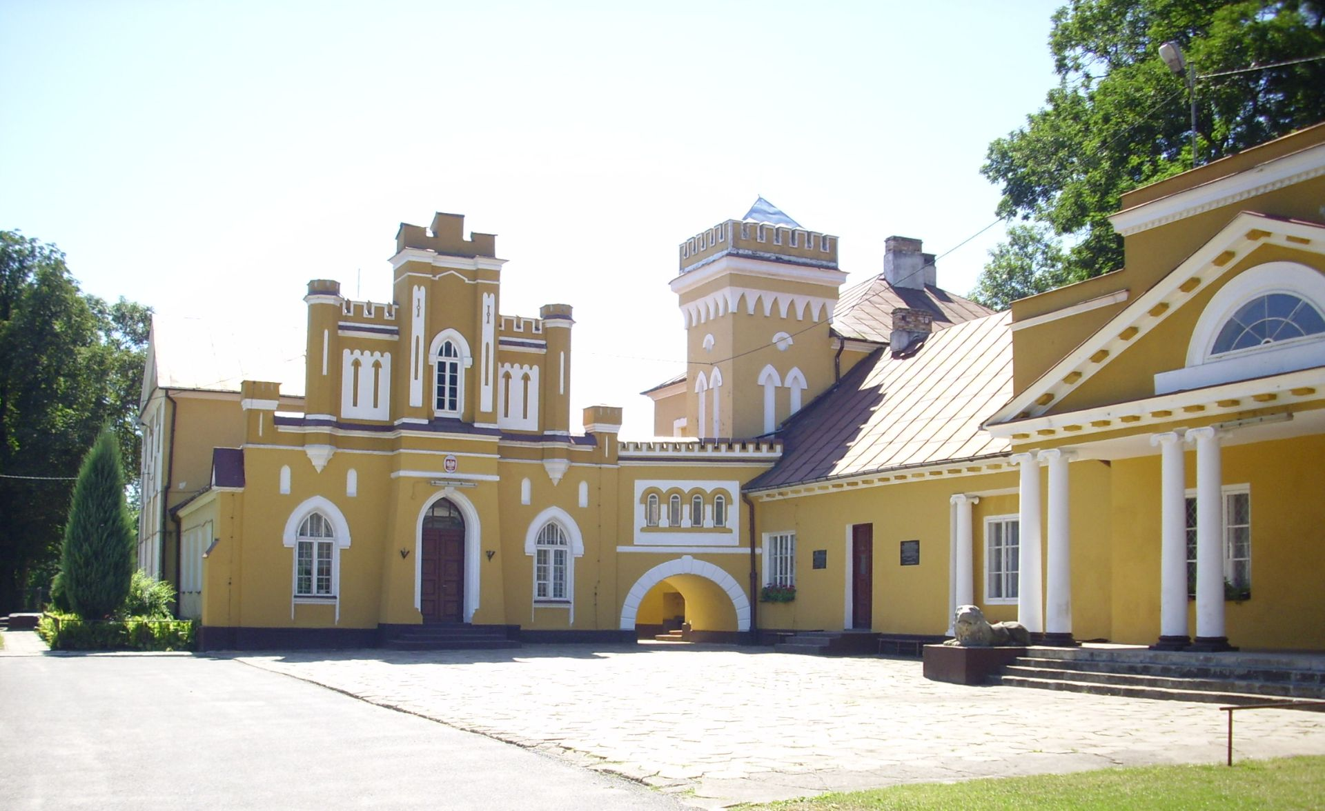 Konstantynów (woj. lubelskie). Pałac w stylu neogotyku angielskiego. (zabytek nr rejestr. 128)